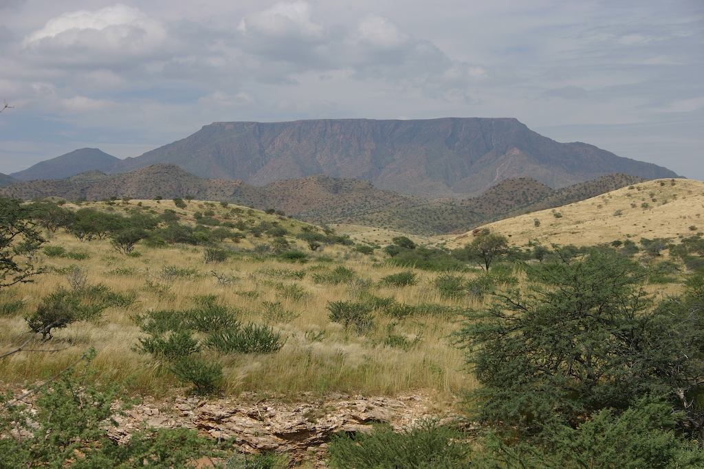 Gamsberg von D1438 aus gesehen